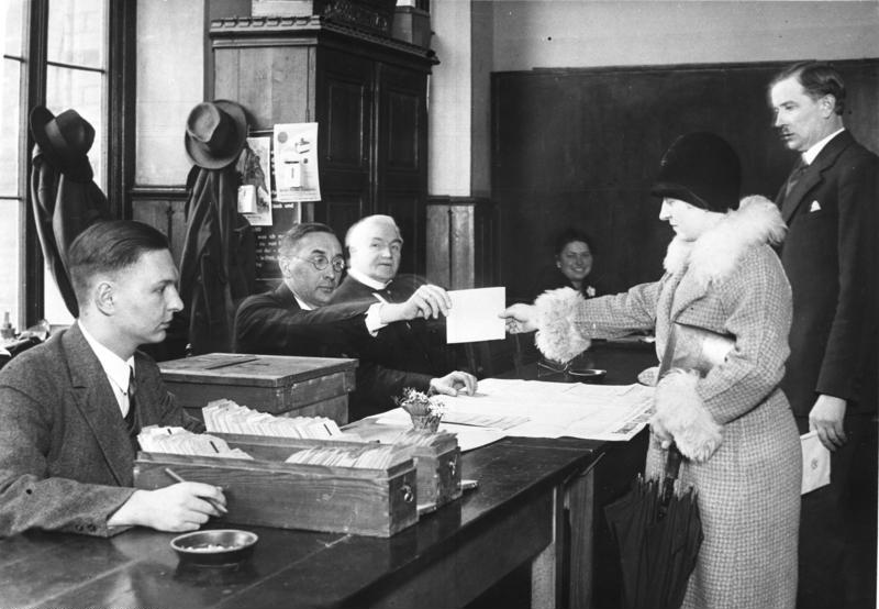 Braunschweiger Wahllokal Reichstagswahl 1931